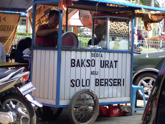 Gerobak Bakso Urat